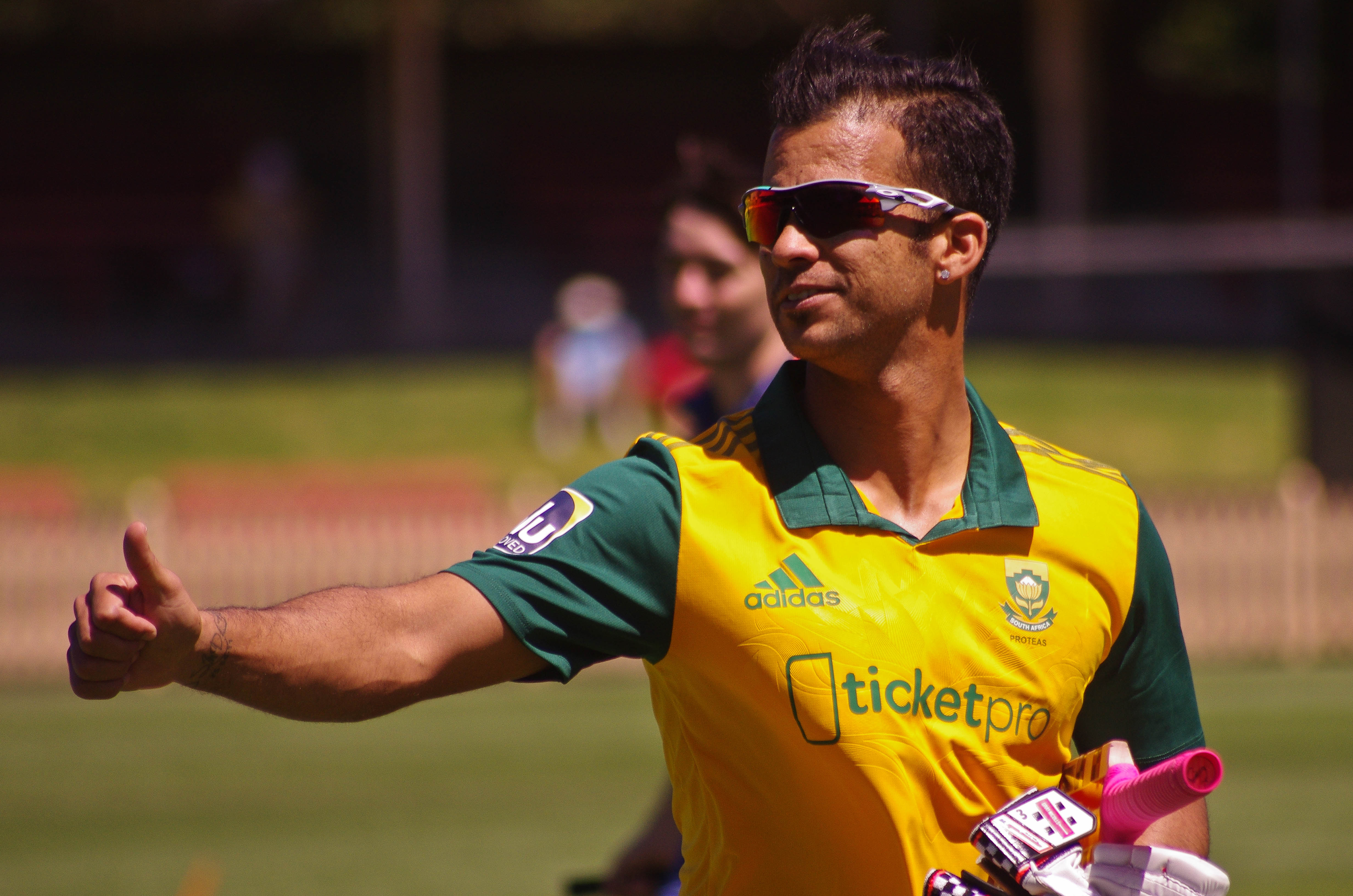 JP DUMINY